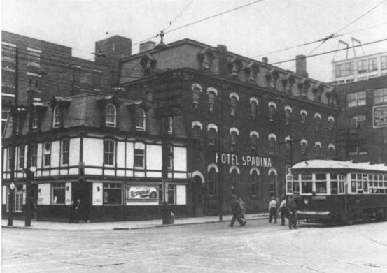 Hotel Spadina in 1948.